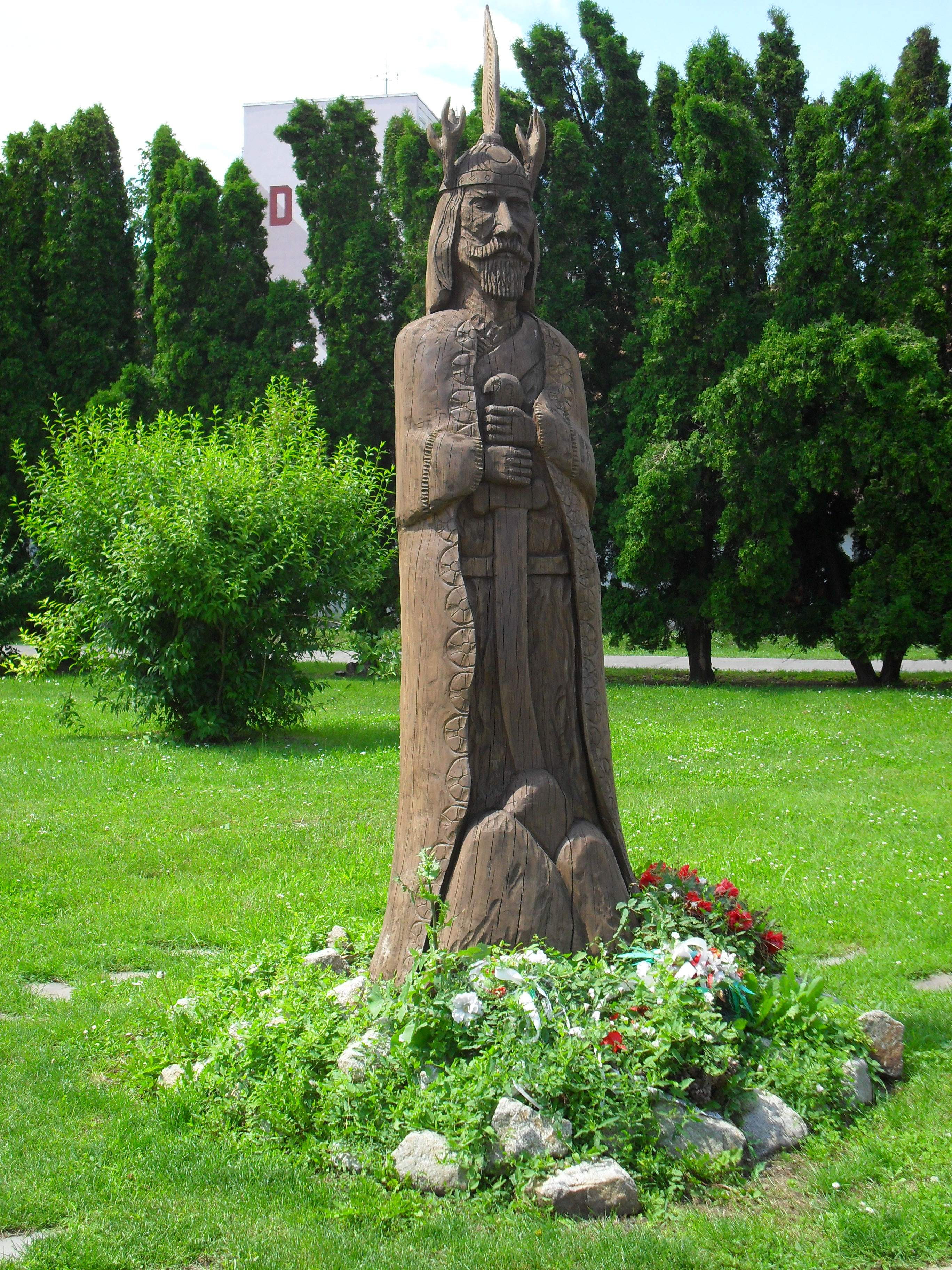 Nagymegyer - Árpád fejedelem szobra a Bartók Béla téren